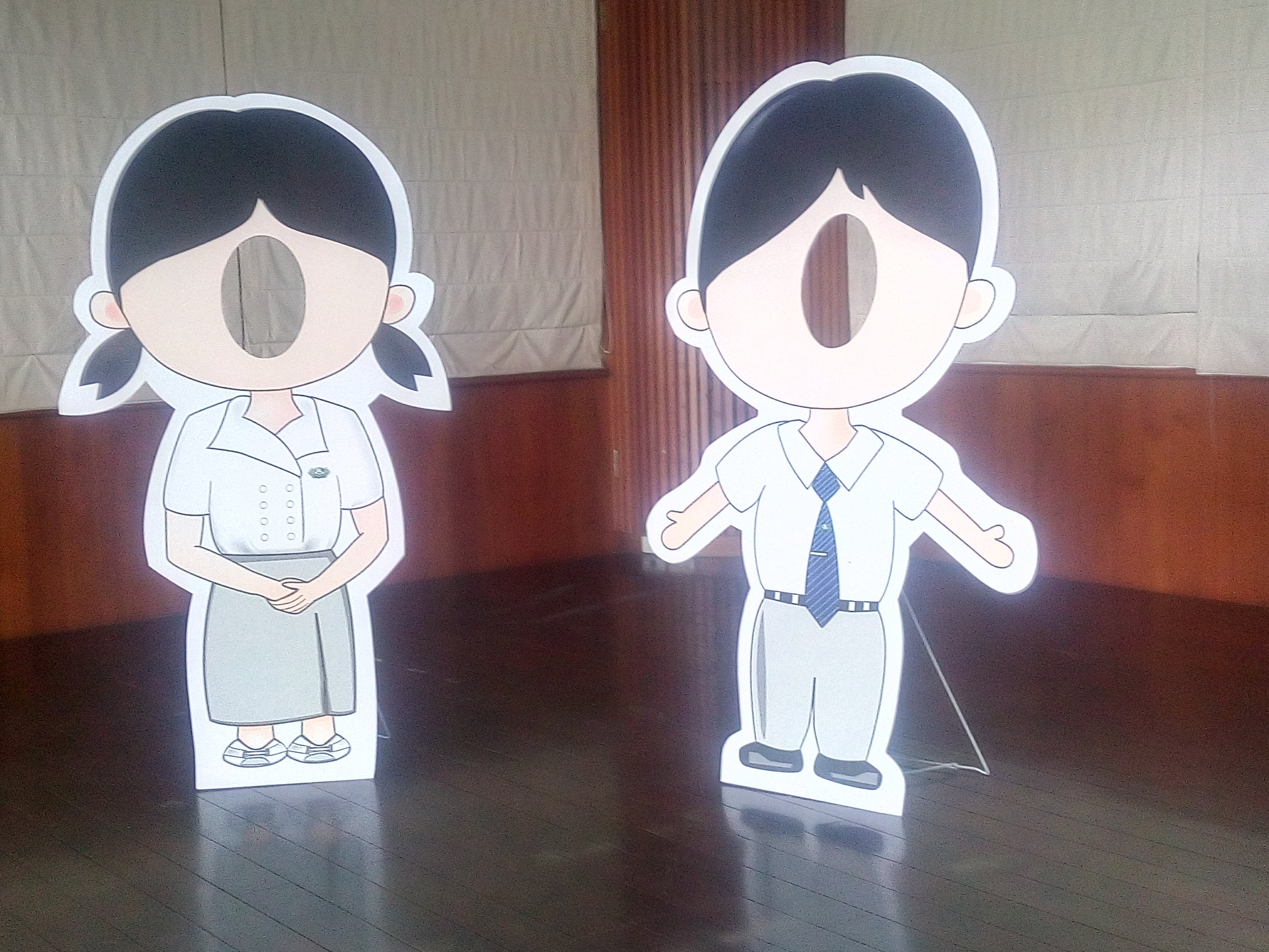 中文（台灣）: 慈濟大學校服Q版立牌